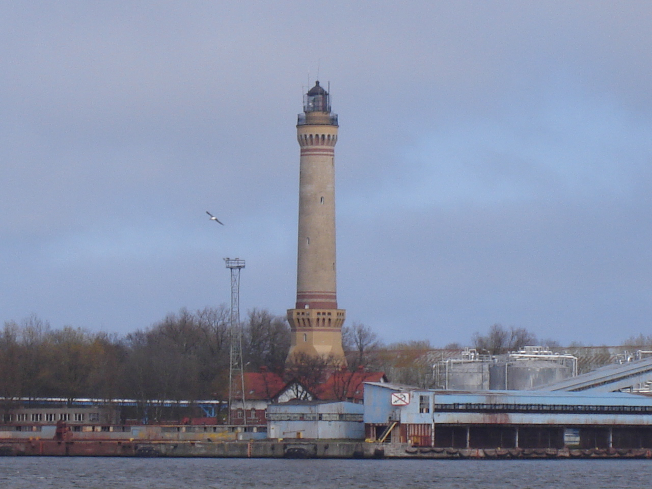 Latarnia morska w Świnoujściu. Autorka: H.Ciszewska-Czyż.